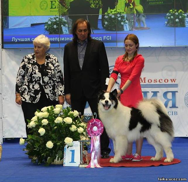 Победитель конкурса "Гордость России" , Лучшая собака непризнанных пород FCI - "Евразия-2014" Якутская лайка Чимги Тура Буранбай, заводчик: Евгения Менеева, хендлер: Елена Тиунцева, Владелец: Юлия Шабалдина, эксперт: Валентина Иванищева и президент РКФ: Александр Иншаков.